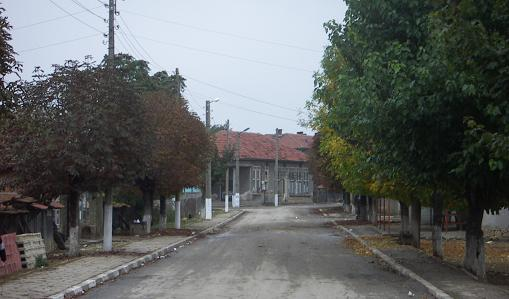 Kılıçköy Ana caddeden görünüm.